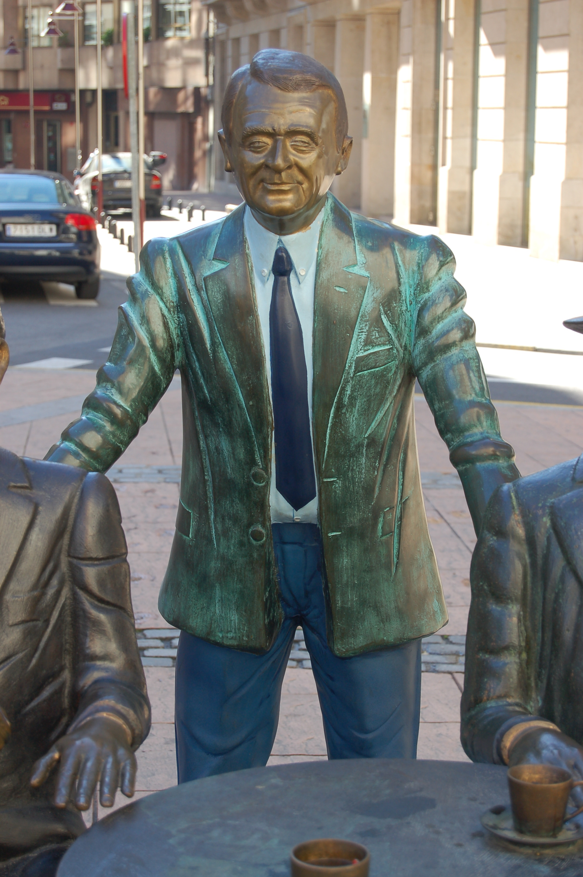 Estatua de Carlos Casares en Pontevedra.